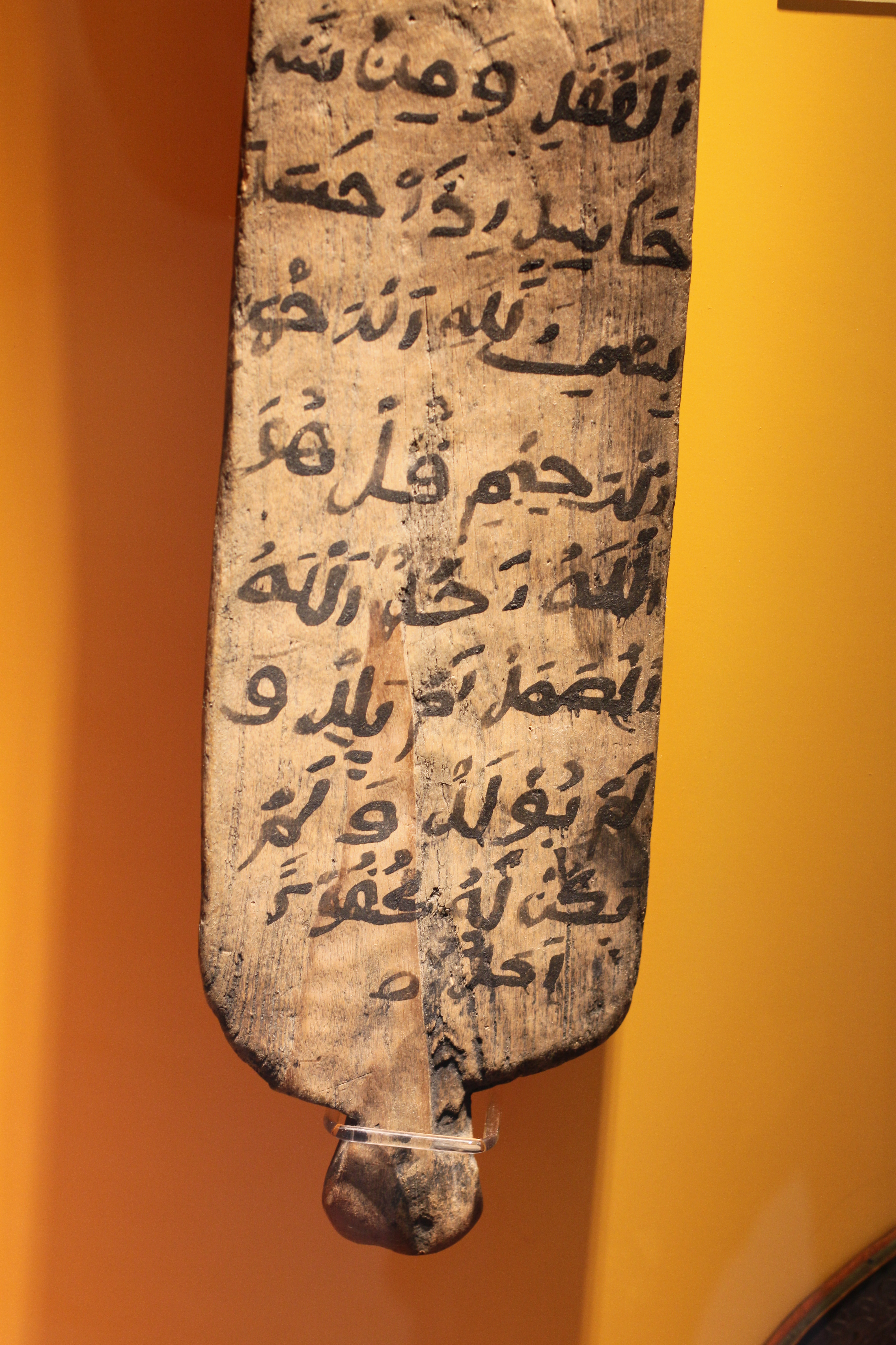 Korantafel; Sammlung Präger 2004; Somalia; im Überseemuseum